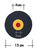 Sarbacana cibles (mesures en centimètres)